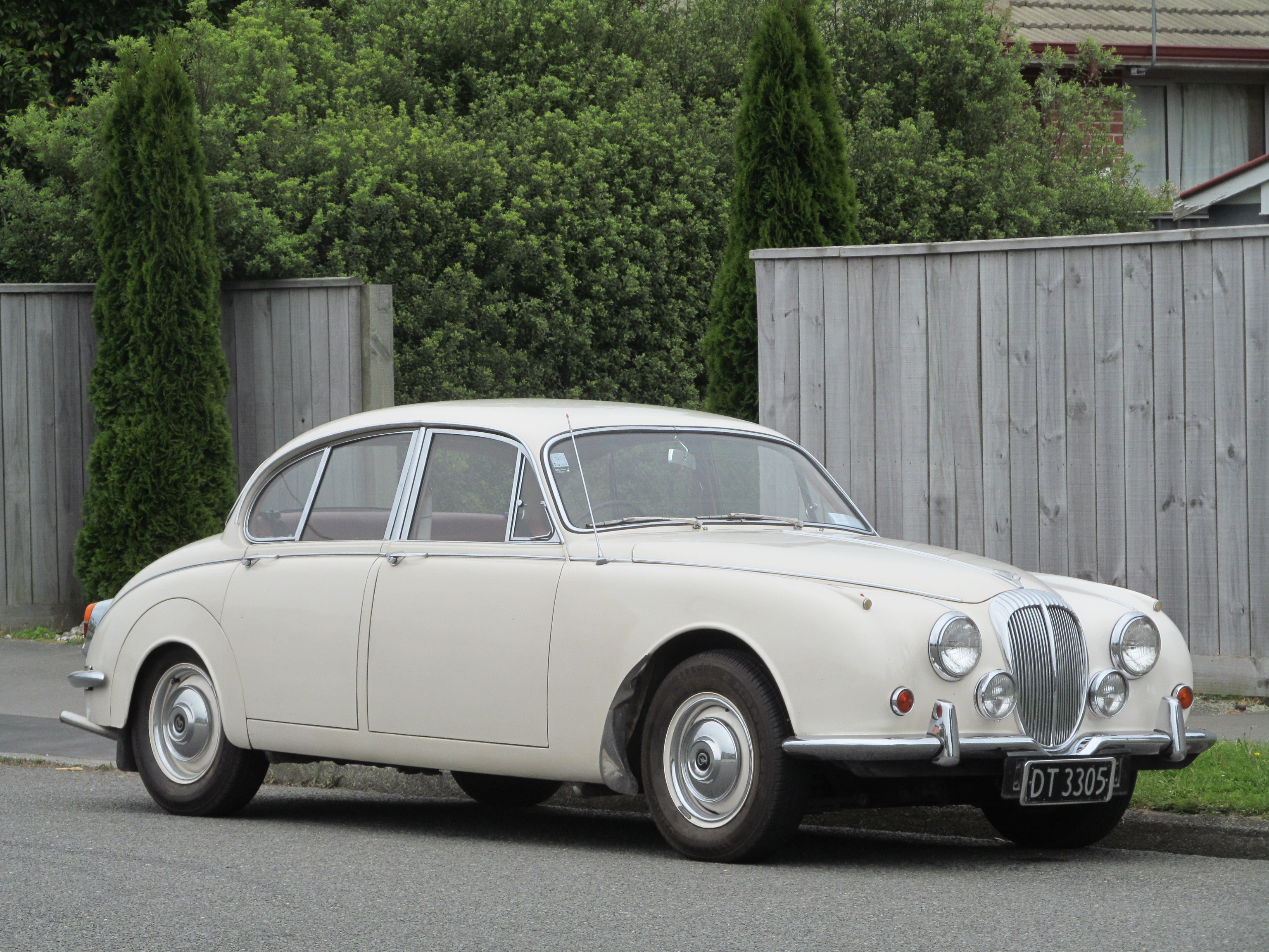 1969 Daimler 250 V8